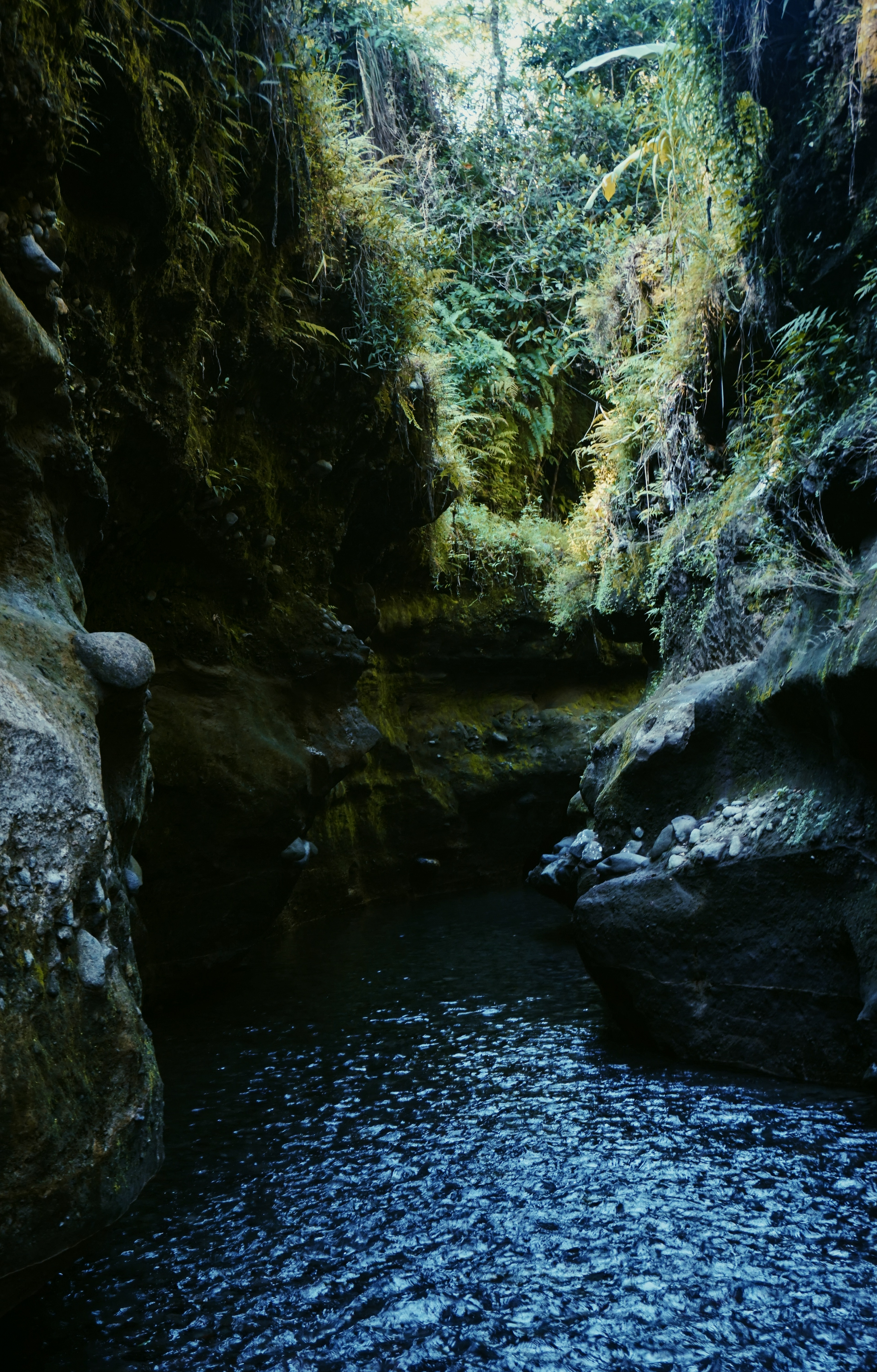 Tempat yang satu ini lagi naik daun di daerah saya, yaa karena tempat ini sangat indah. Dari namanya saja kita juga sudah bisa memastikan betapa indahnya tempat ini. Alam yang masih asri menambah keindahan tempat ini Dan juga tempat ini terbilang masih perawan lho Karena apa? Karena belum banyak masyarakat yang mengetahui keberadaan tempat ini. Tempat ini juga sering disebut "hidden paradise". Akan terapi kalian tak usah khawatir, karena untuk menjangkau tempat ini sangat mudah,kalian bisa menjangkaunya dengan mobil kok Oiya,tempat ini berlokasi di dukuh sidobener, desa socokangsi, kecamatan jatinom, kabupaten klaten Tiket masuk juga sangat terjangkau, kalian hanya perlu membayar parkir sebesar Rp.2000 dan karcis masuk seikhlasnya Jadi,tak ada alasan lagi untuk tidak mengunjungi tempat yang super indah ini!!!